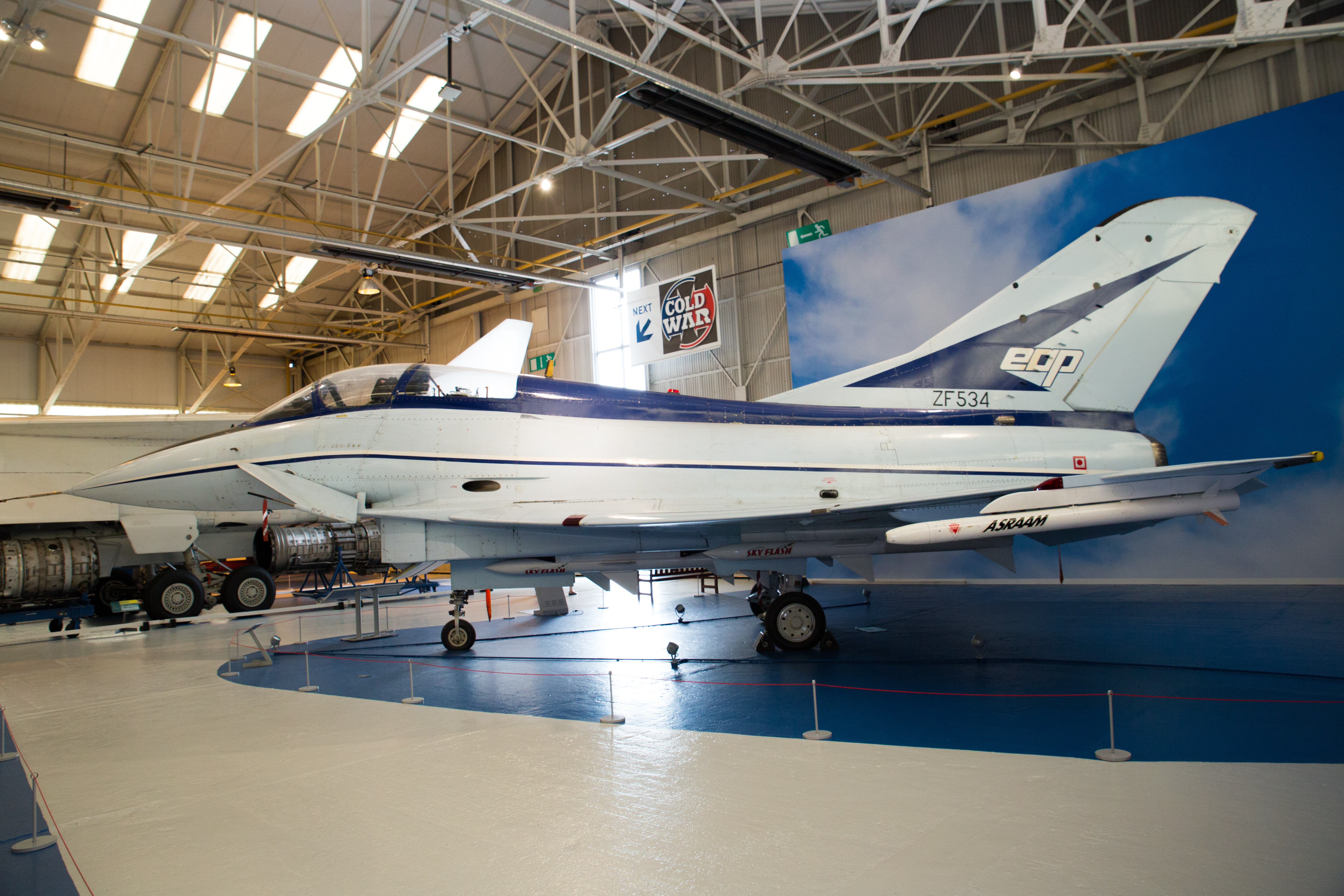 BAe EAP